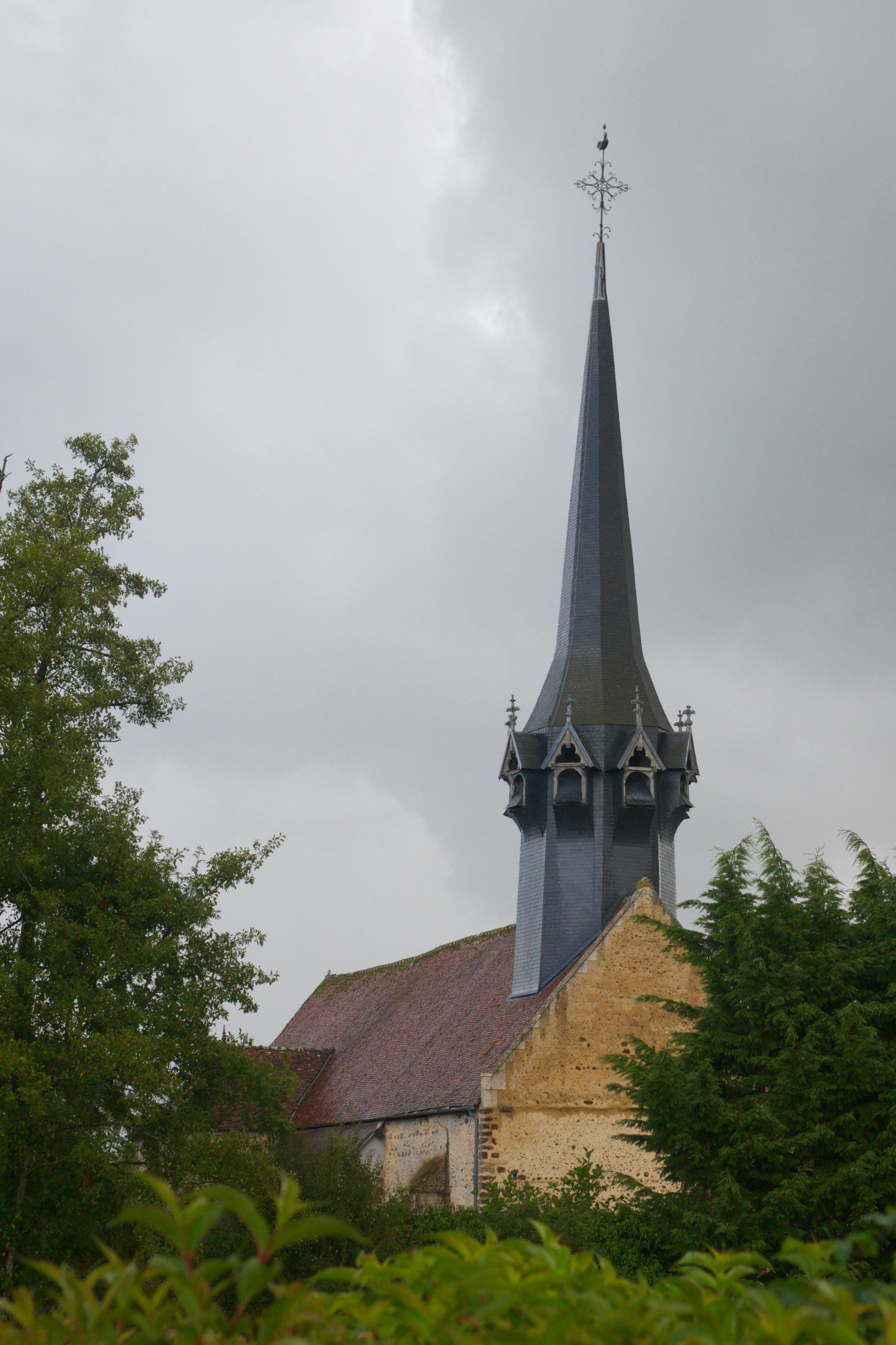 Église Saint-Martin de Cintray .